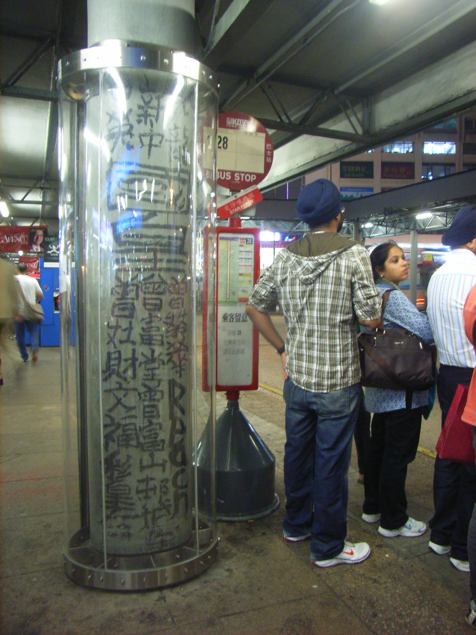 尖沙咀曾灶財